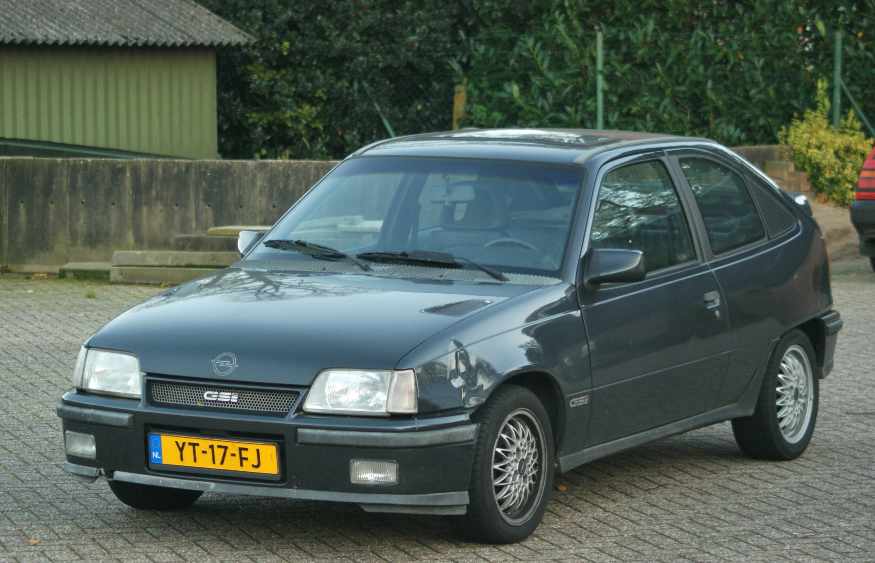 YT-17-FJ